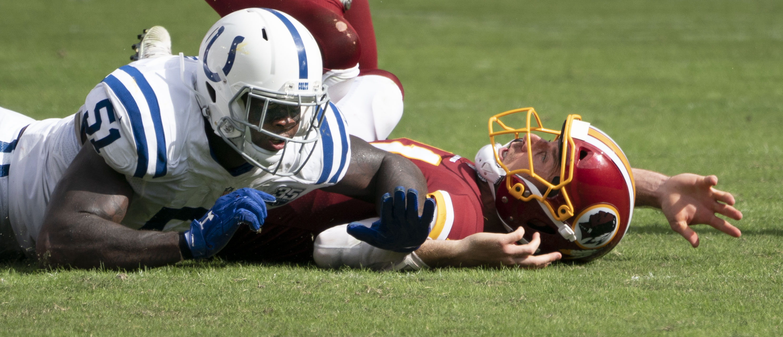 Colts at Redskins 09/16/18